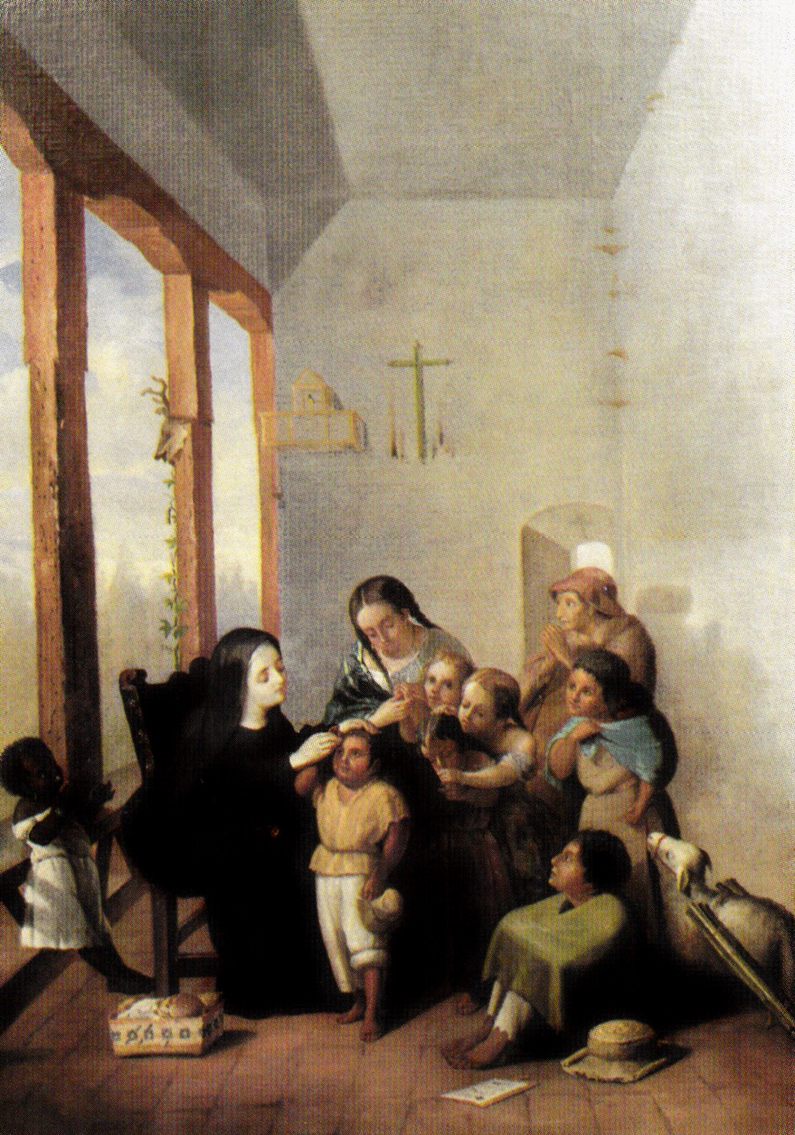 "Santa Mariana catequista", Joaquín Pinto, inicios del siglo XX. Óleo sobre lienzo que se exhibe en el Museo Nacional de la ciudad de Quito.